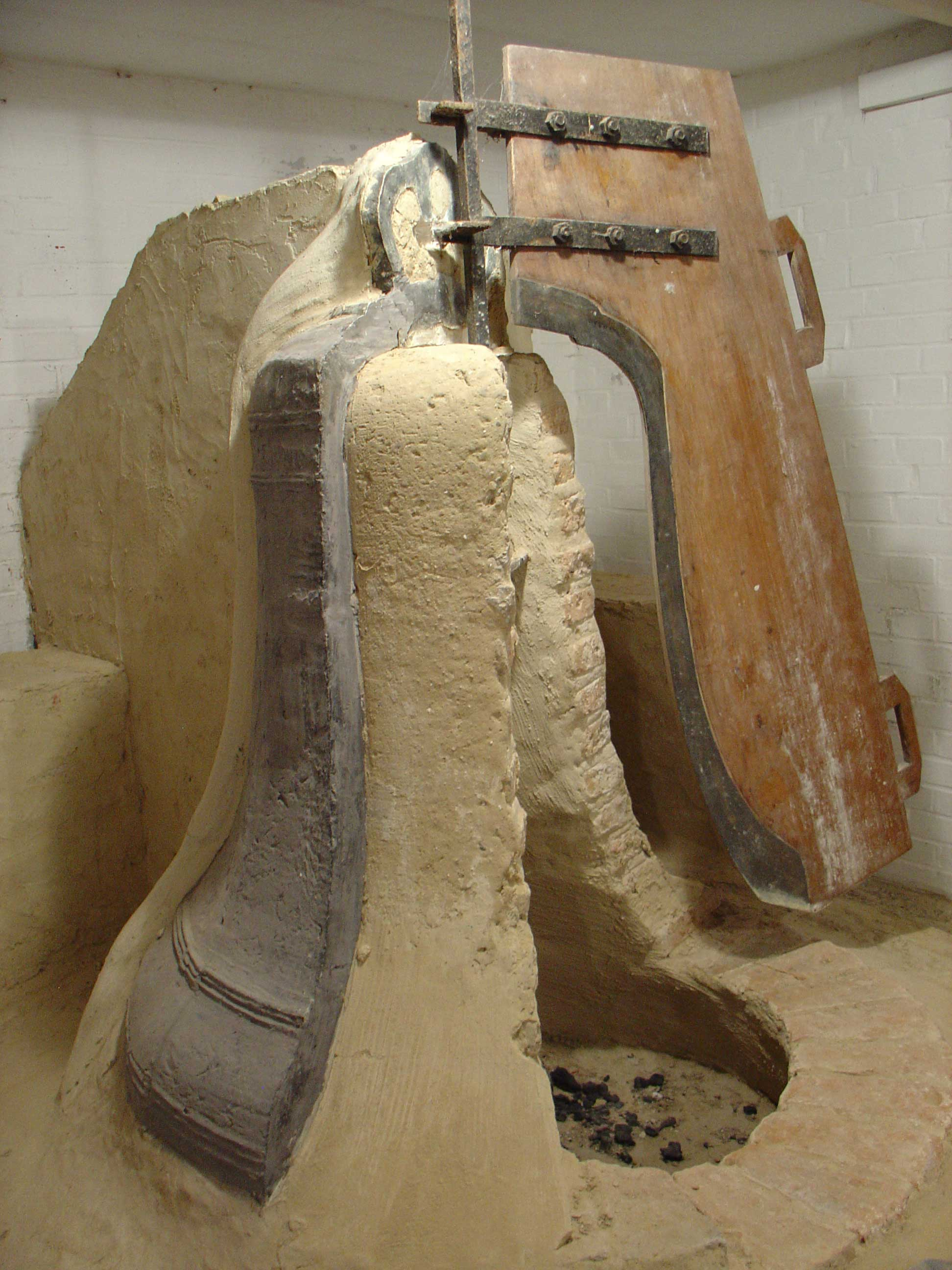 mal van de Mariaklok in de Sint Bonifatiuskerk van Vries